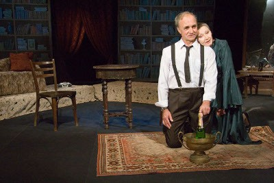 Сцена з вистави "Осінні квіти" (режисер - Олександр Балабан, Харківський державний академічний драматичний театр ім.Т.Г.Шевченка, 2007 р.)